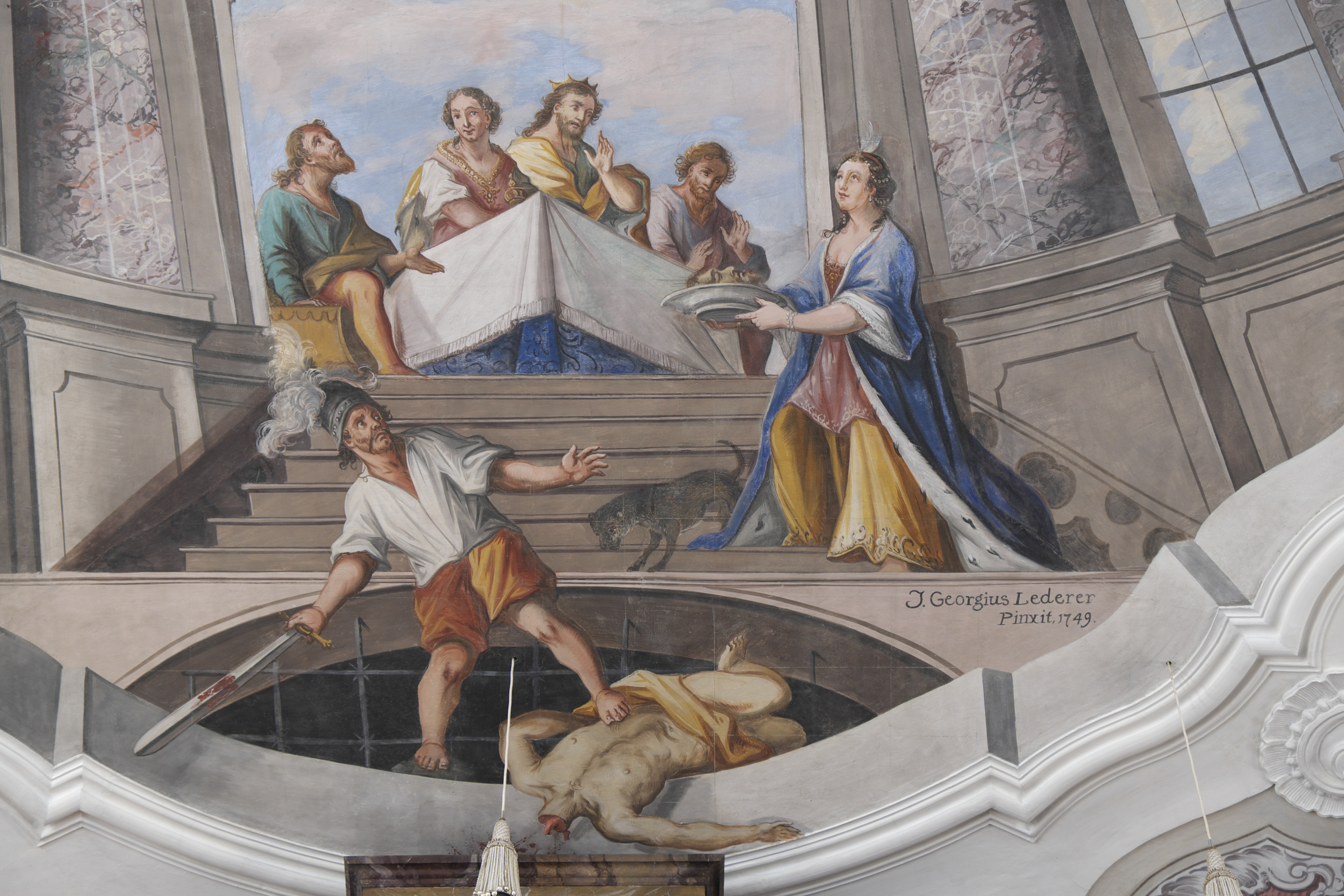 Katholische Pfarrkirche Johannes der Täufer in Unterigling (Igling) im Landkreis Landsberg am Lech (Bayern/Deutschland), Deckenfresko von Johann Georg Lederer, mit der Signatur: J. Georgius Lederer Pinxit. 1749., Darstellung: Enthauptung des Johannes (Ausschnitt)